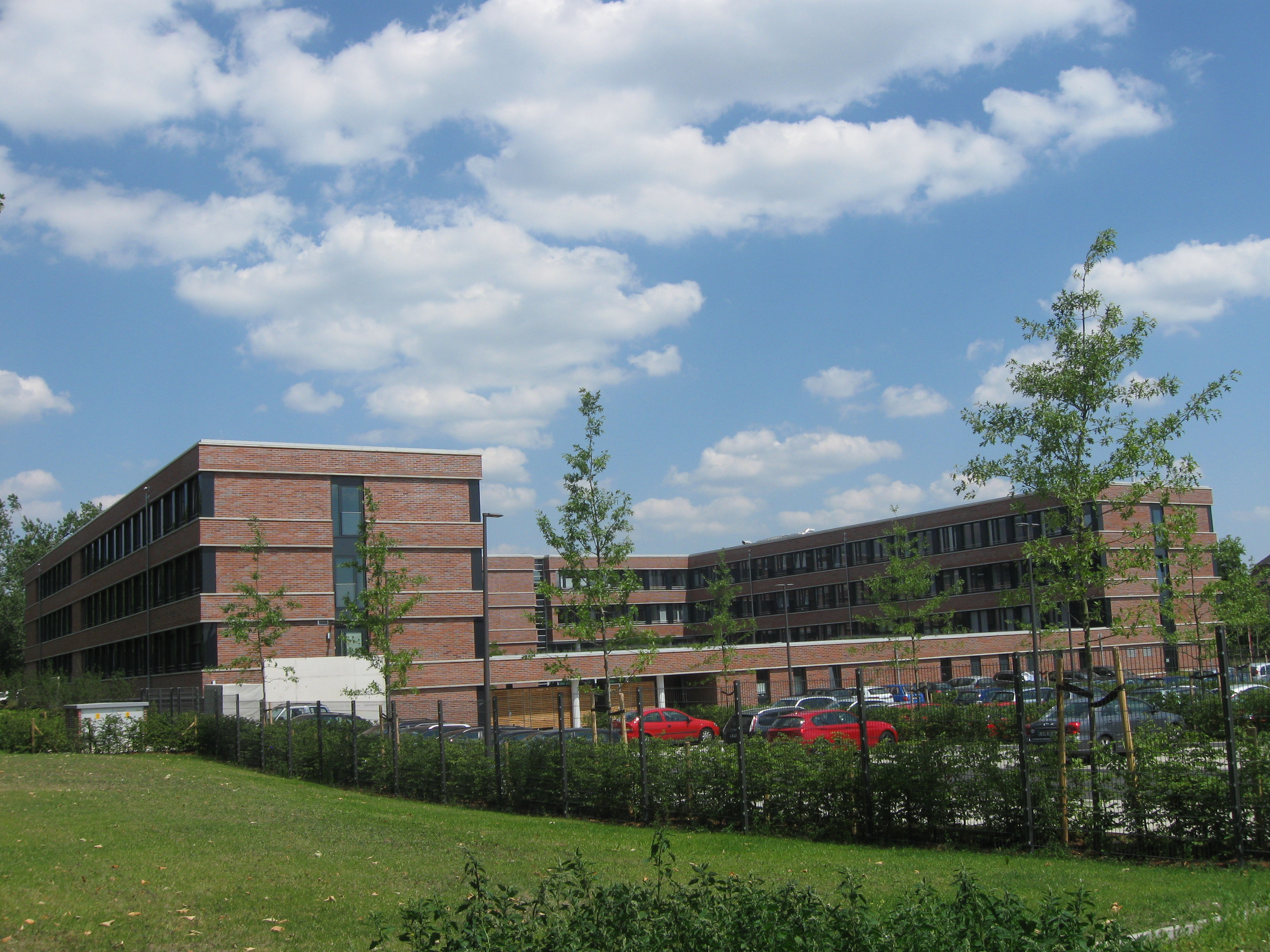 Dienstgebäude des 2015 zusammengelegten Finanzamtes Gelsenkirchen (Neubau, bezogen im Mai 2015) an der Ludwig-Erhard-Straße 1, hier: Gebäuderückfront mit Parkplatz und Blick über den Innenhof (Westseite)